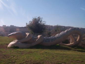 פסל_הלטאה